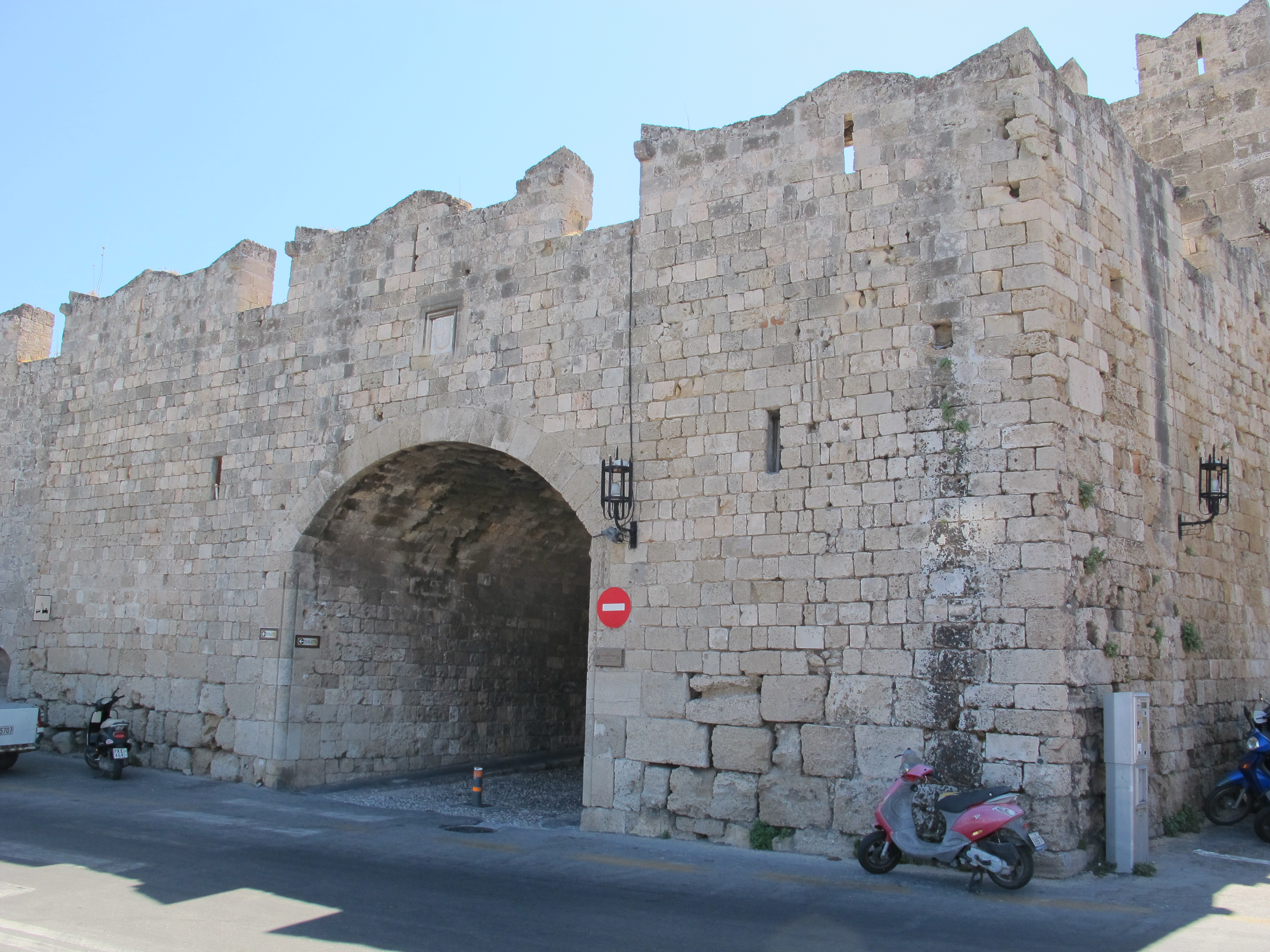 Rodi, porta d'arnaldo